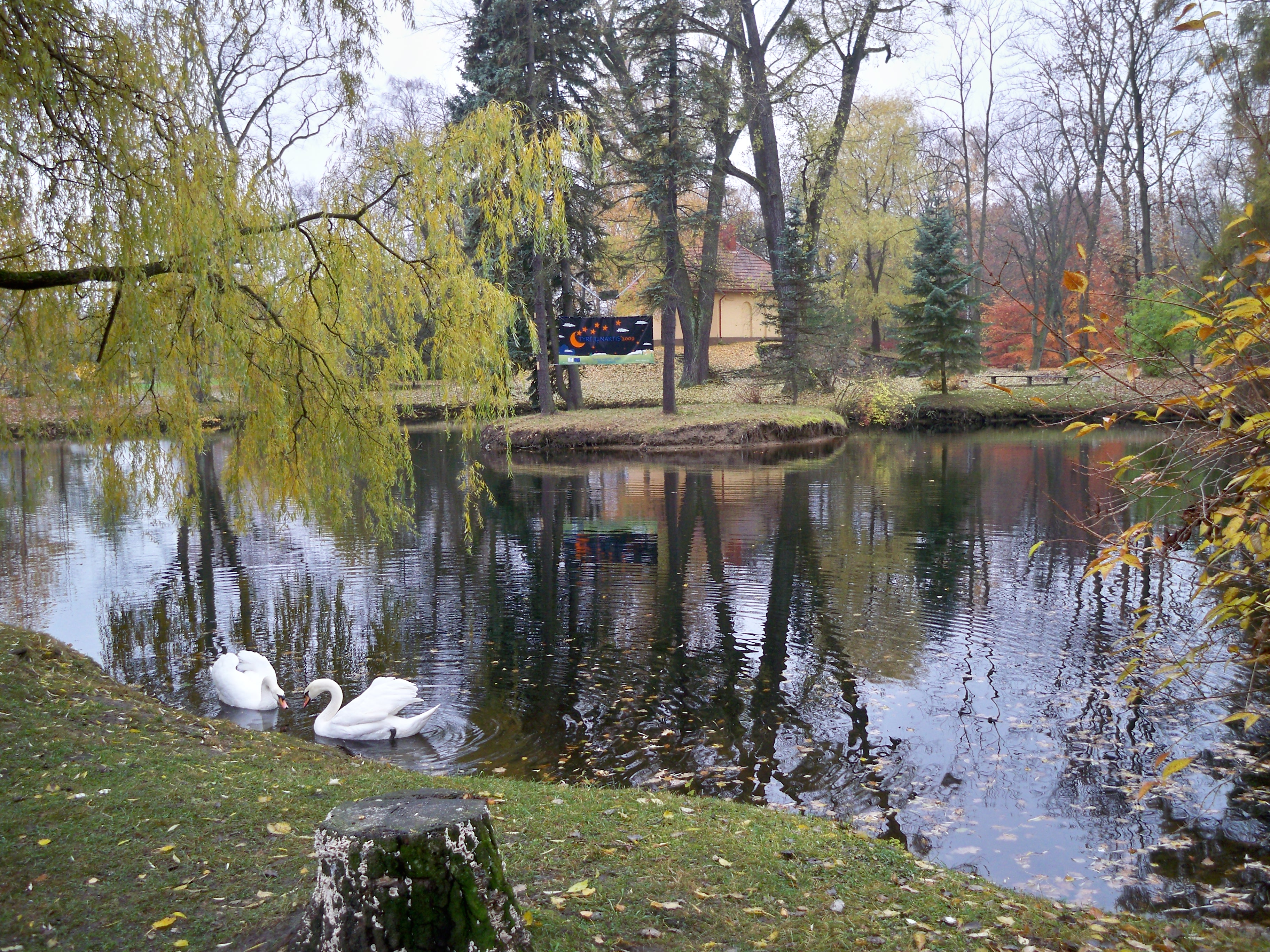 Fredos dvaro (botanikos sodo) tvenkinys.